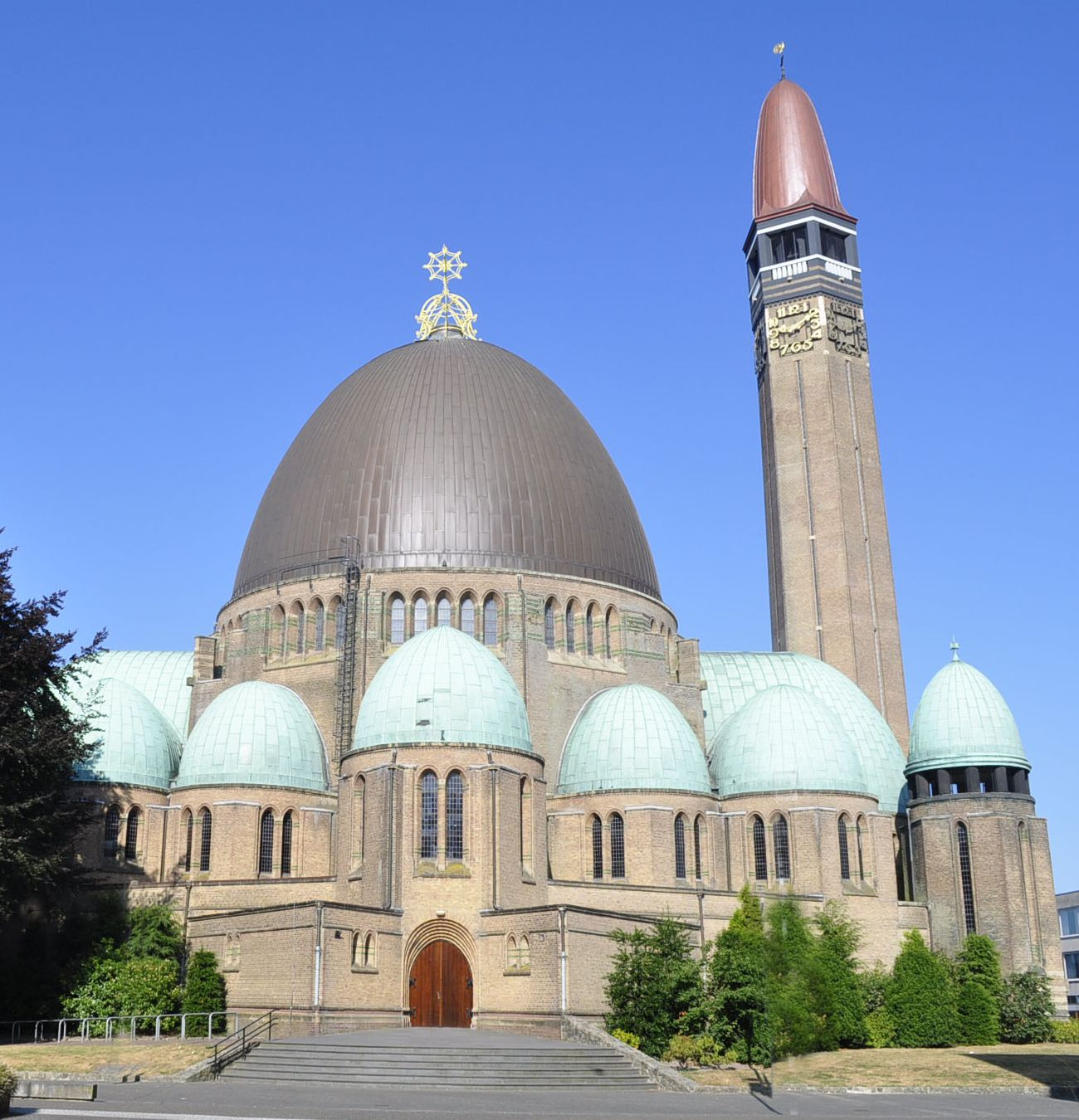 Oostgevel van de Sint Jan de Doper in Waalwijk